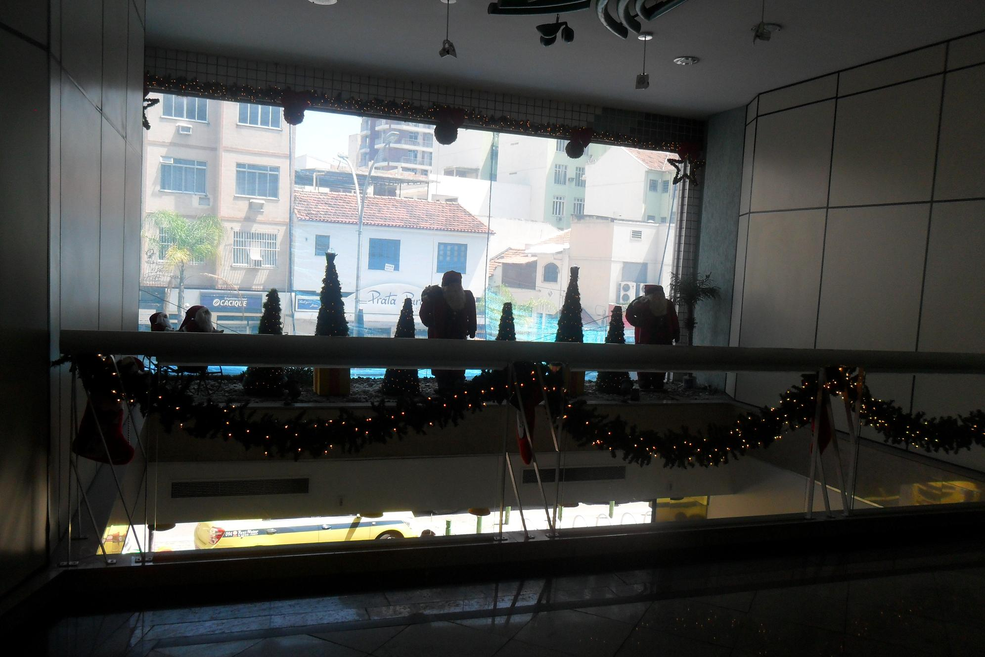 Shopping do Meier, e vista da Rua Dias da Cruz ao fundo.